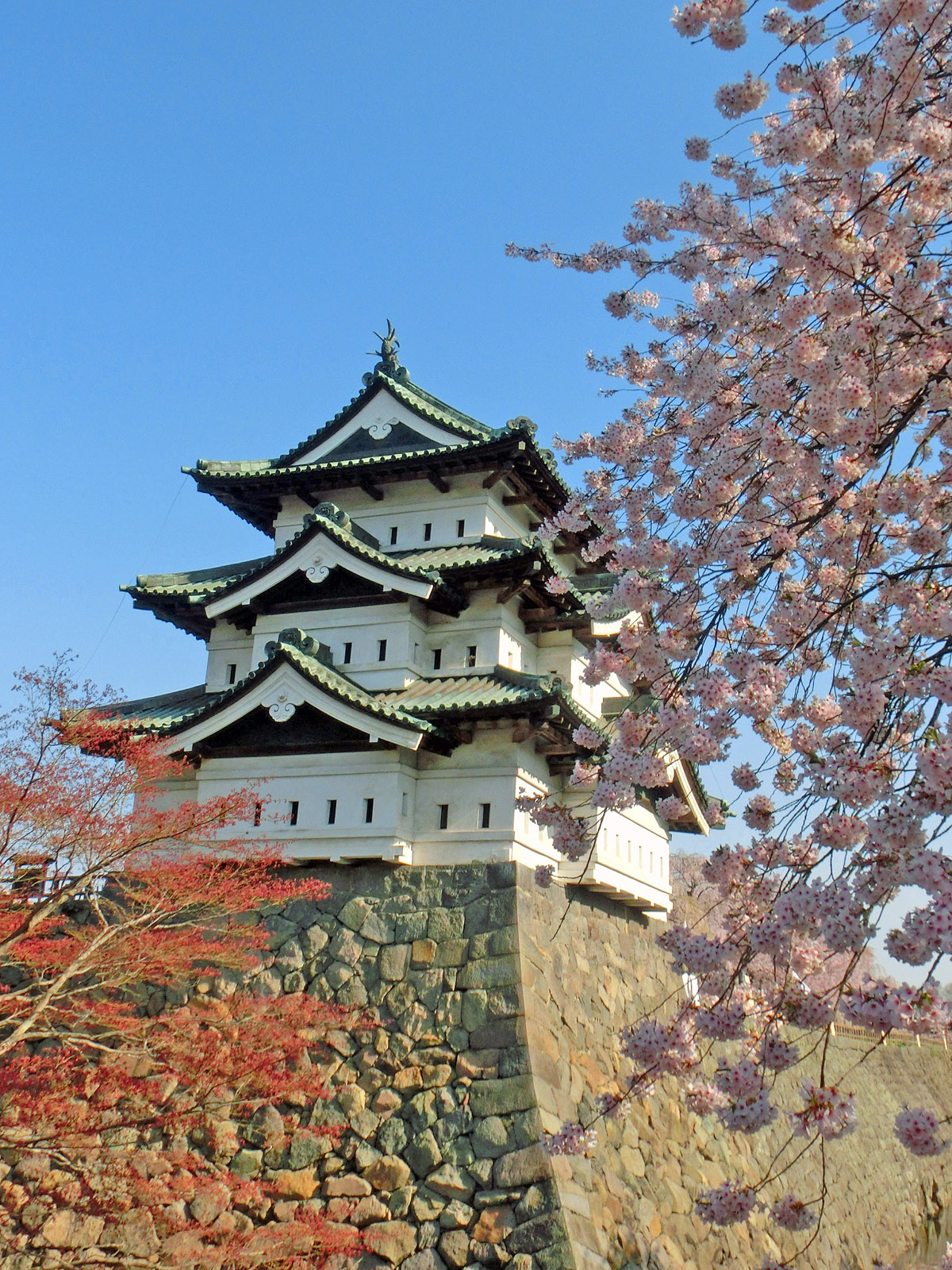 春の弘前城（青森県弘前市下白銀町）の様子